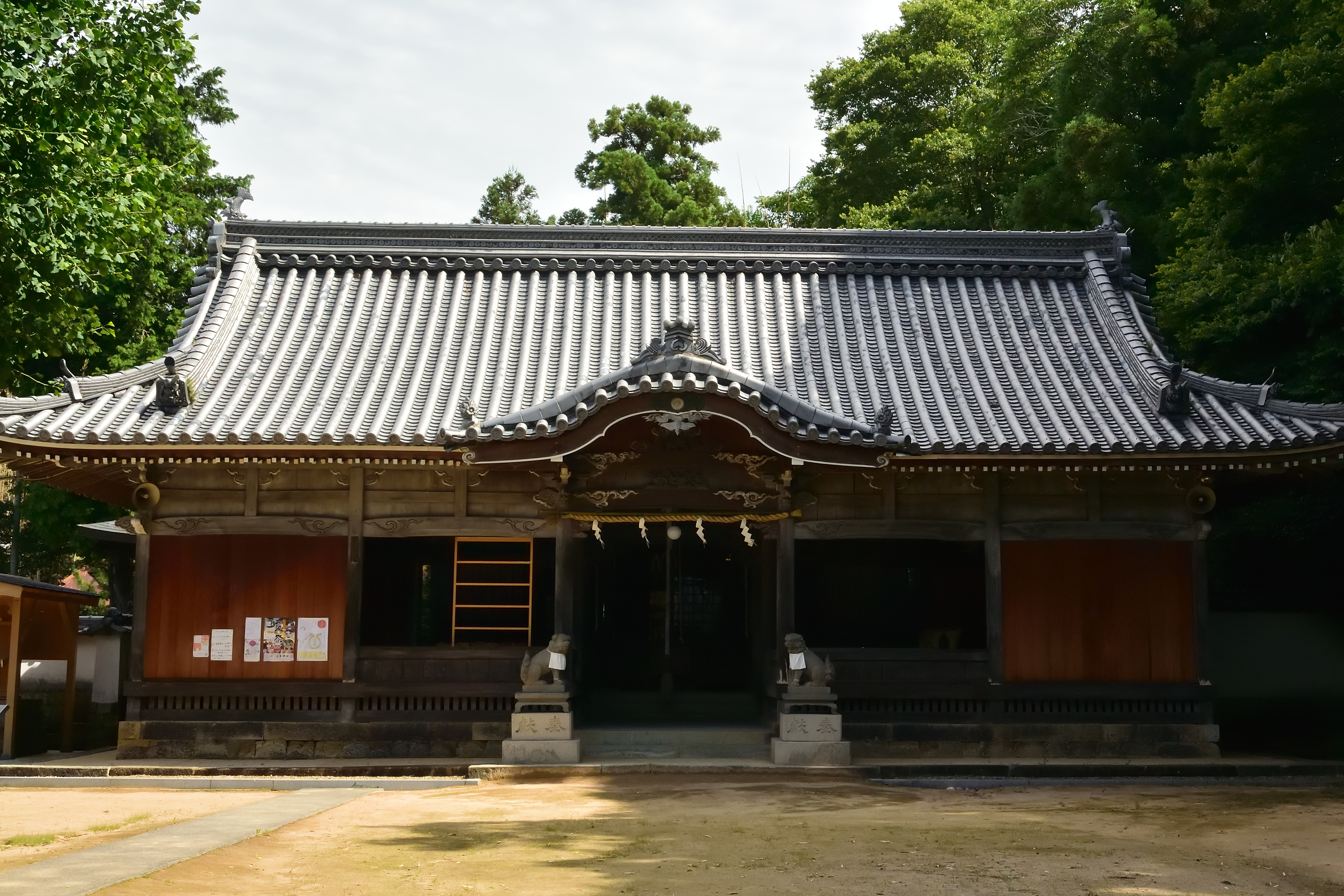 小野市住吉神社 拝殿